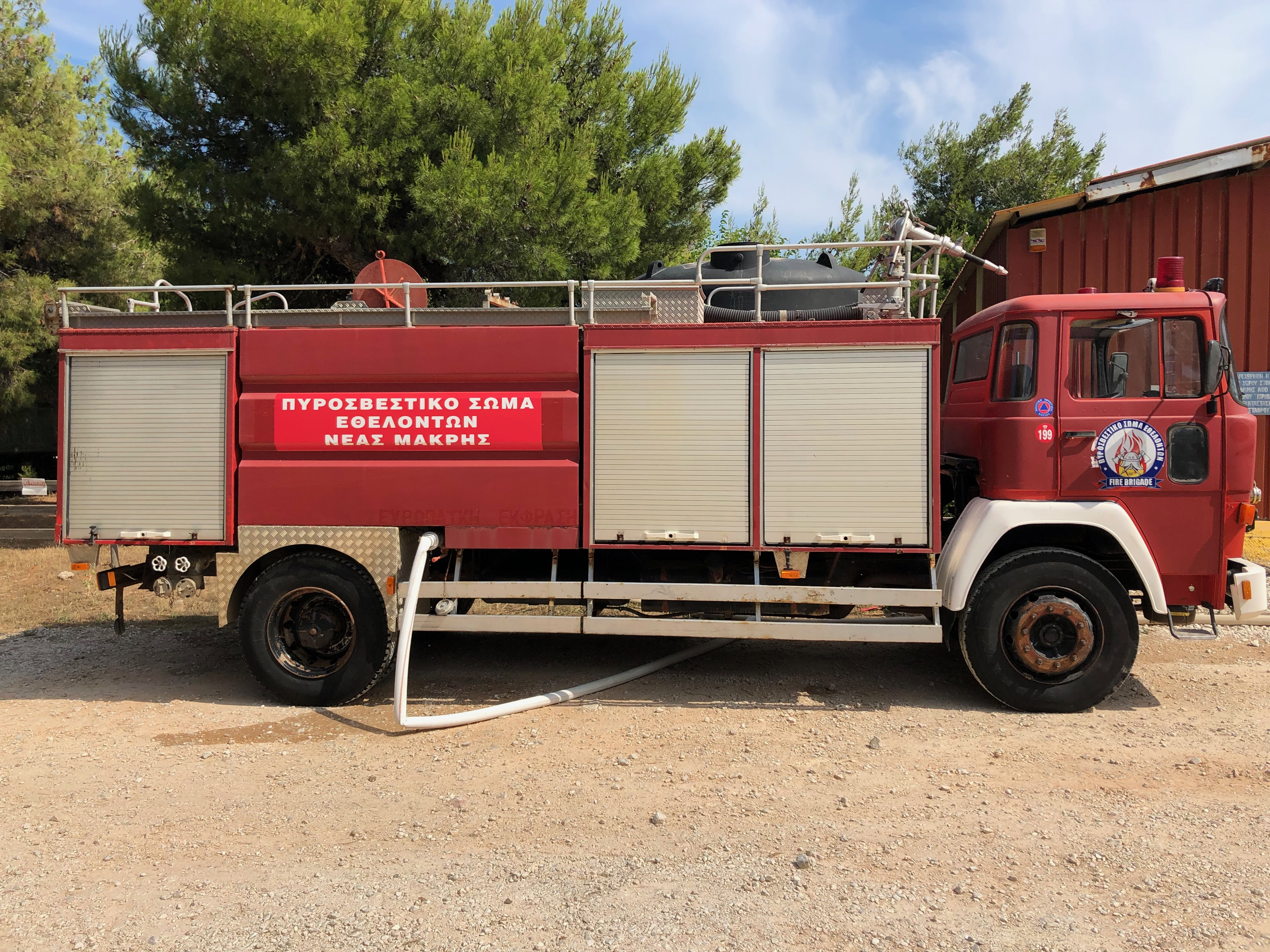 Fahrzeug einer Freiwilligen Feuerwehr in der Gemeinde Marathon.